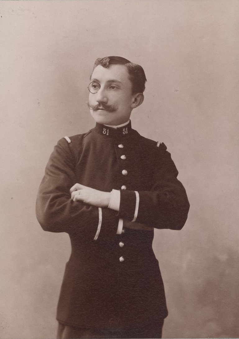 Portrait de Charles Lamy aux Folies Dramatiques en 1893 pour la représentation de Cousin-Cousine